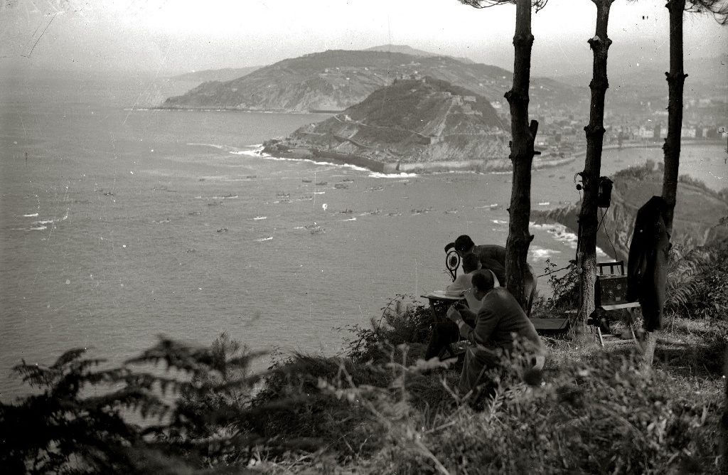 Título original: José Zubimendi (1898-1939) transmitiendo las regatas desde Igeldo para Unión Radio San Sebastián (3/3) Localización: San Sebastián (Guipúzcoa)